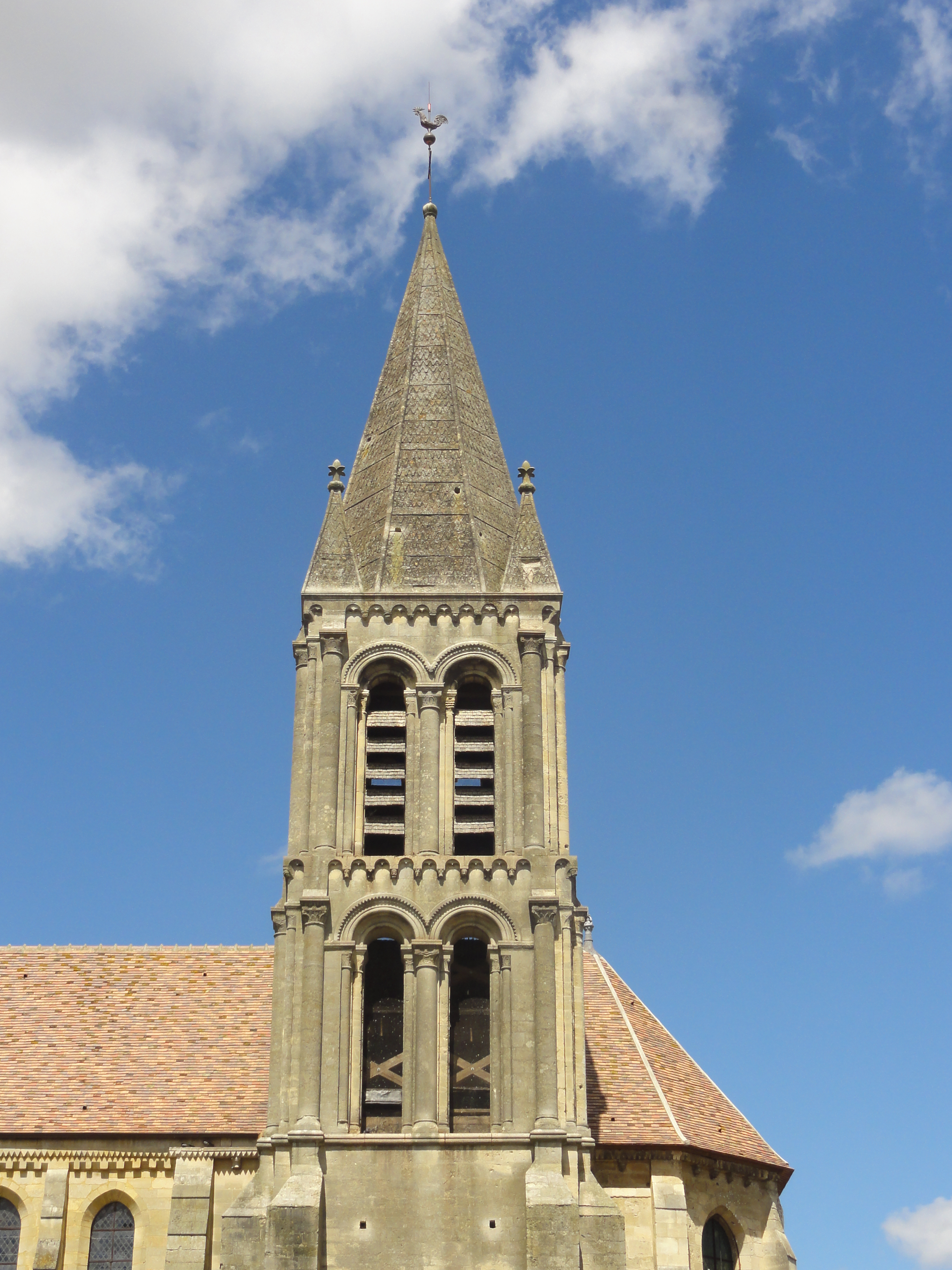 Clocher.